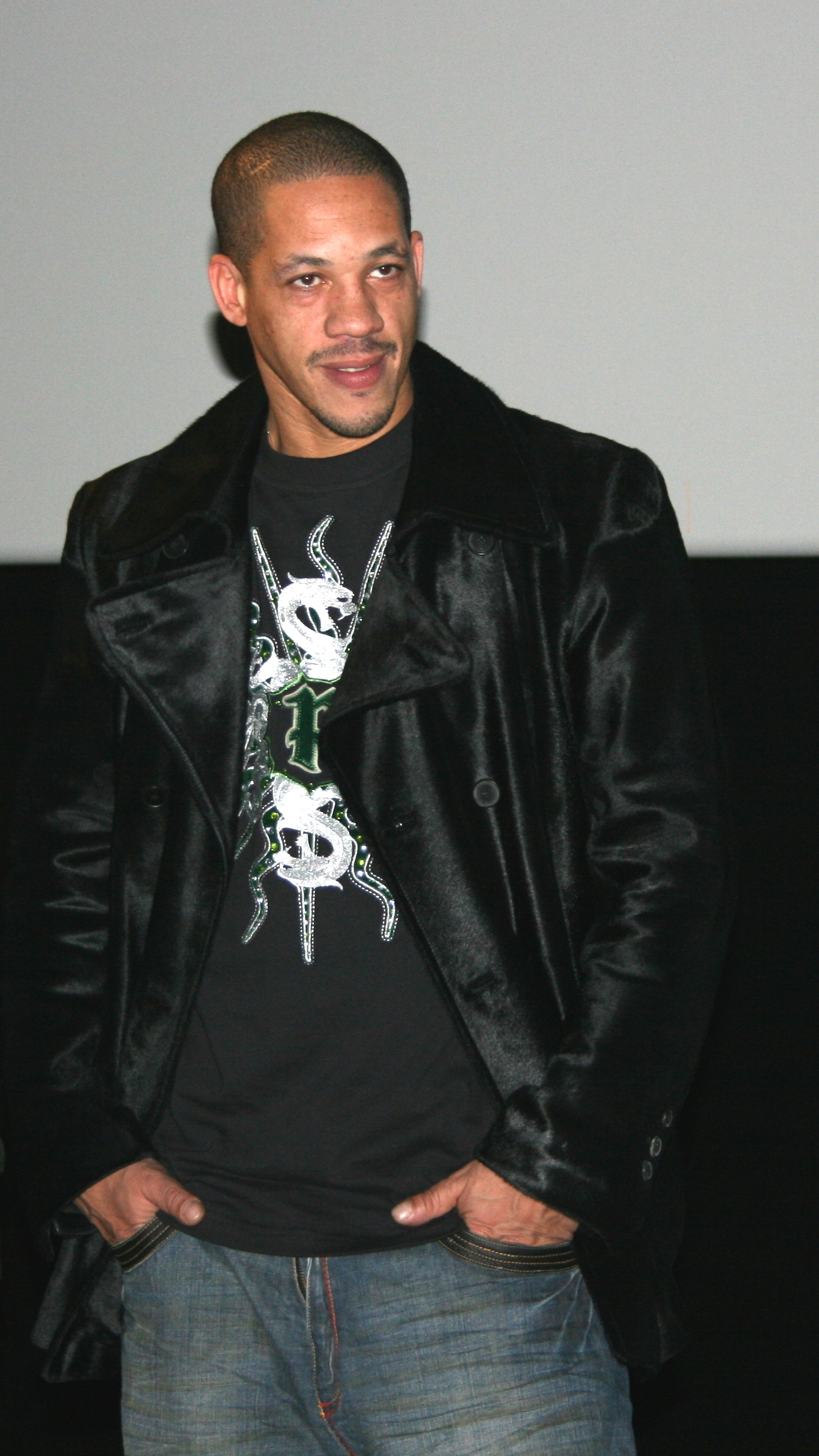 JoeyStarr à l'avant-première de Passe-passe diffusée à l'UGC Ciné Cité Les Halles, à Paris.